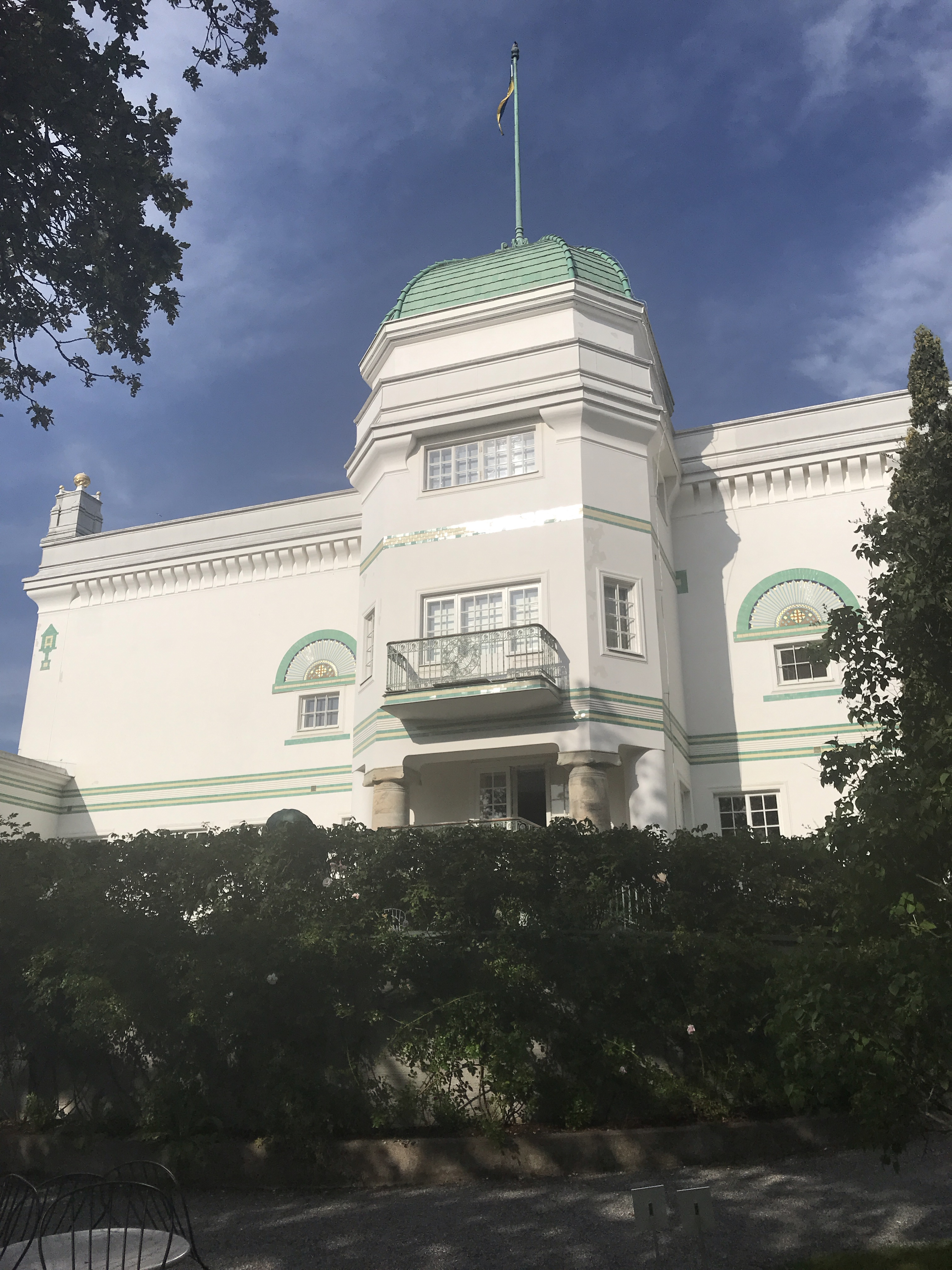 Djurgården Stockholm